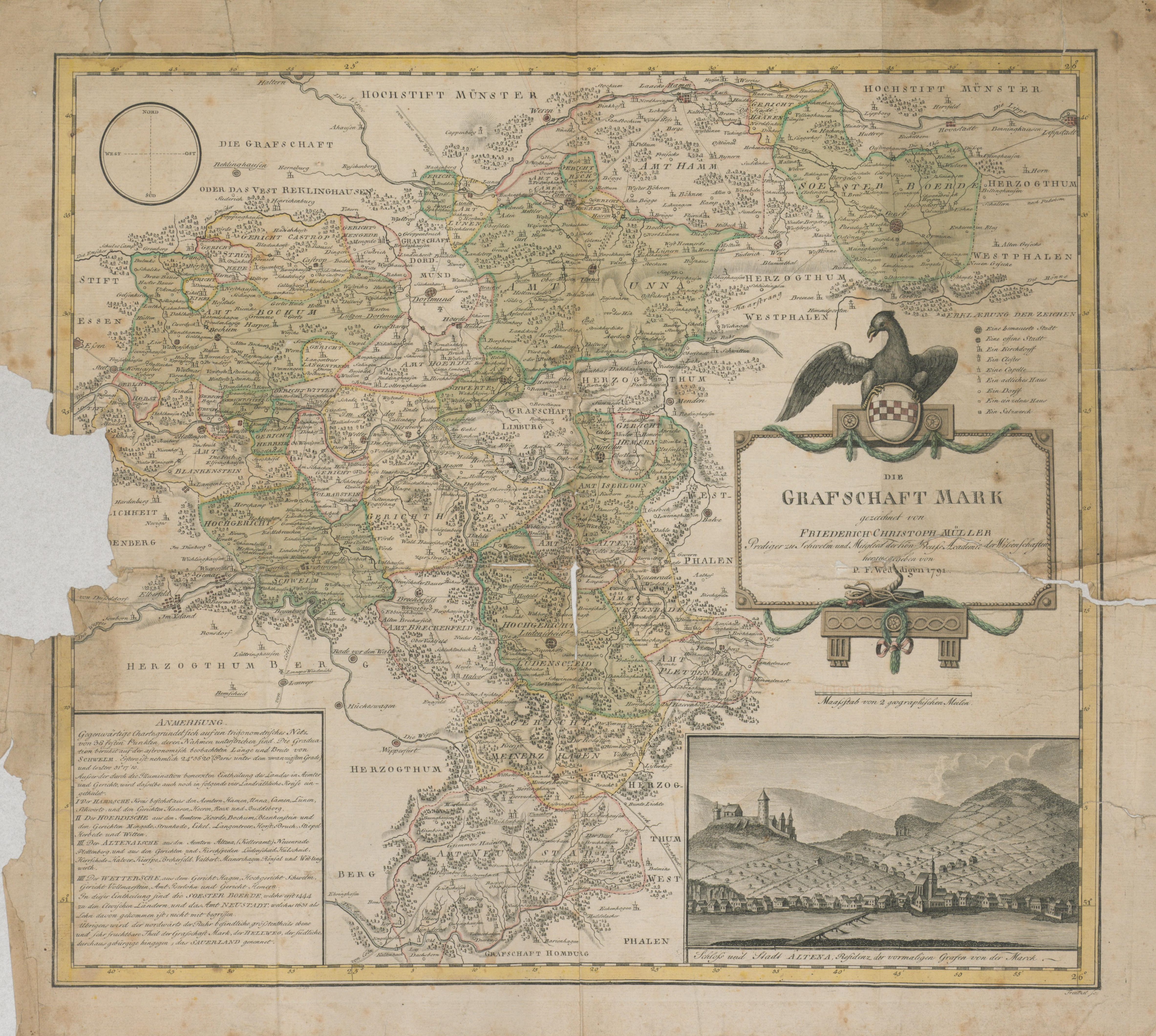 Karte der Grafschaft Mark (mit Illustration Burg Altena)